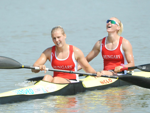 Kárász Anna és Vad Ninetta a 2013-as Kajak-kenu Világkupán (Szeged)